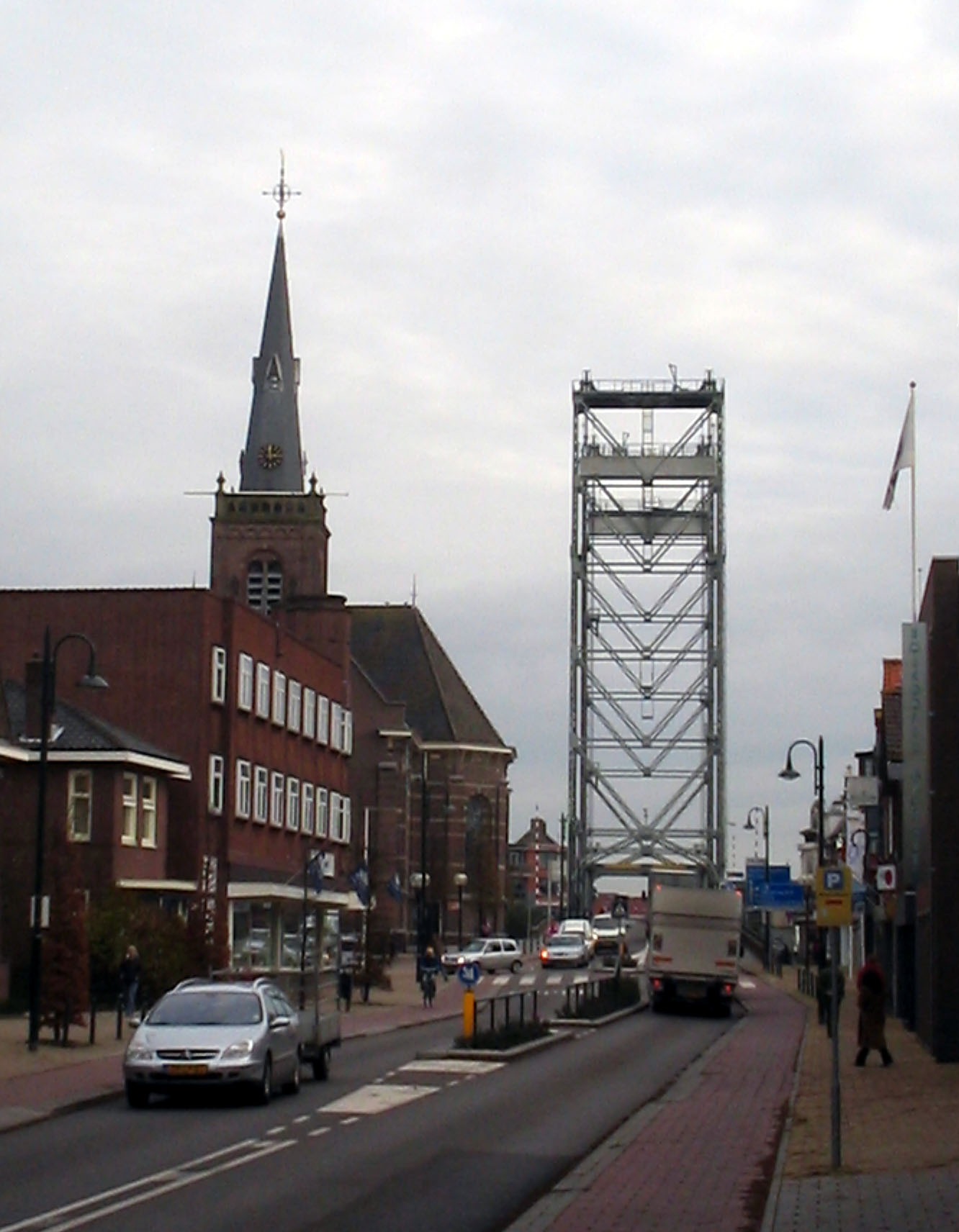 Kerk